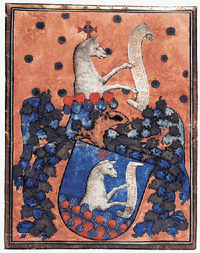 Bachvai Dempse Balázs és fia Márton címere